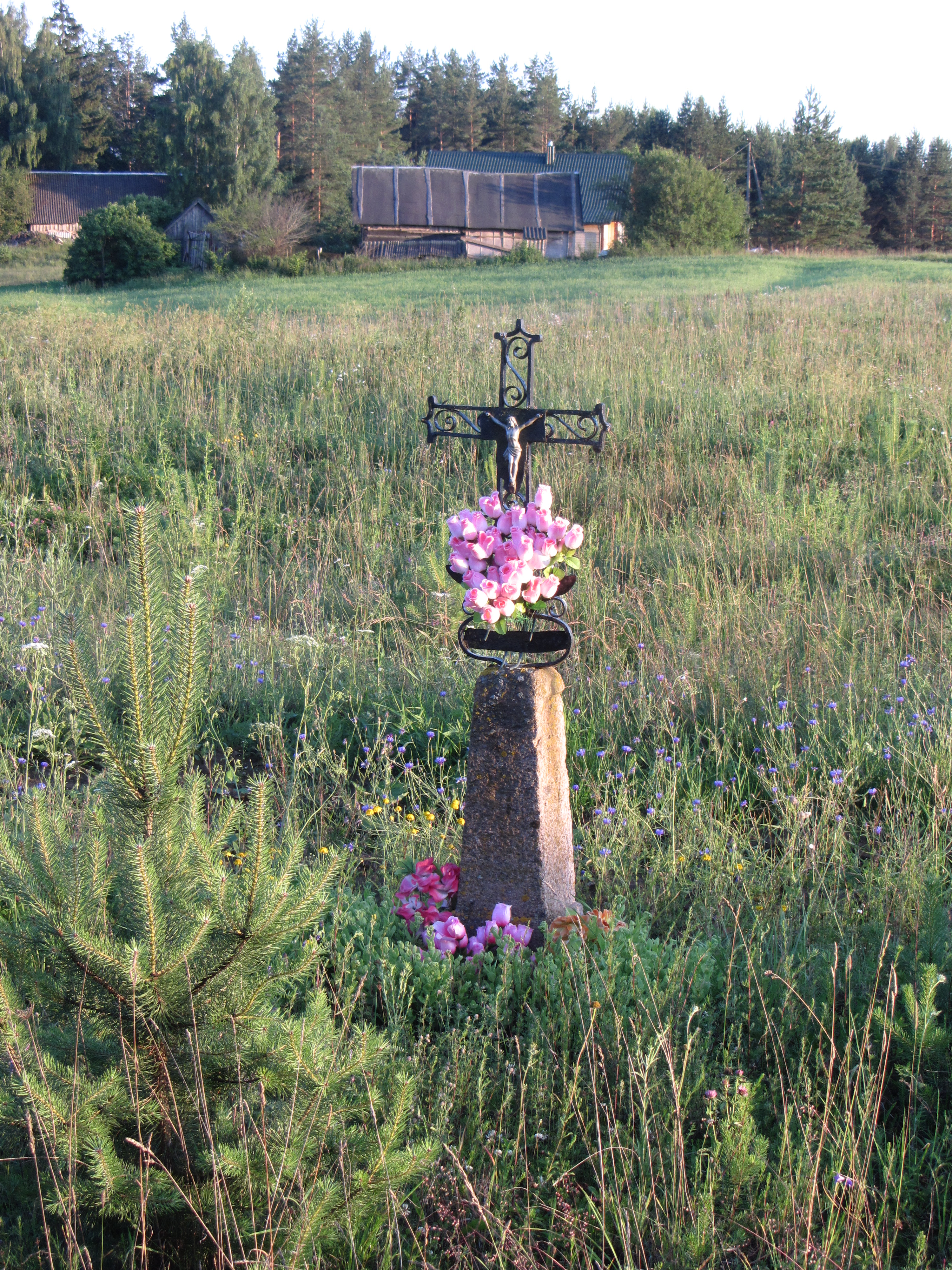 Zarasų sen., Lithuania